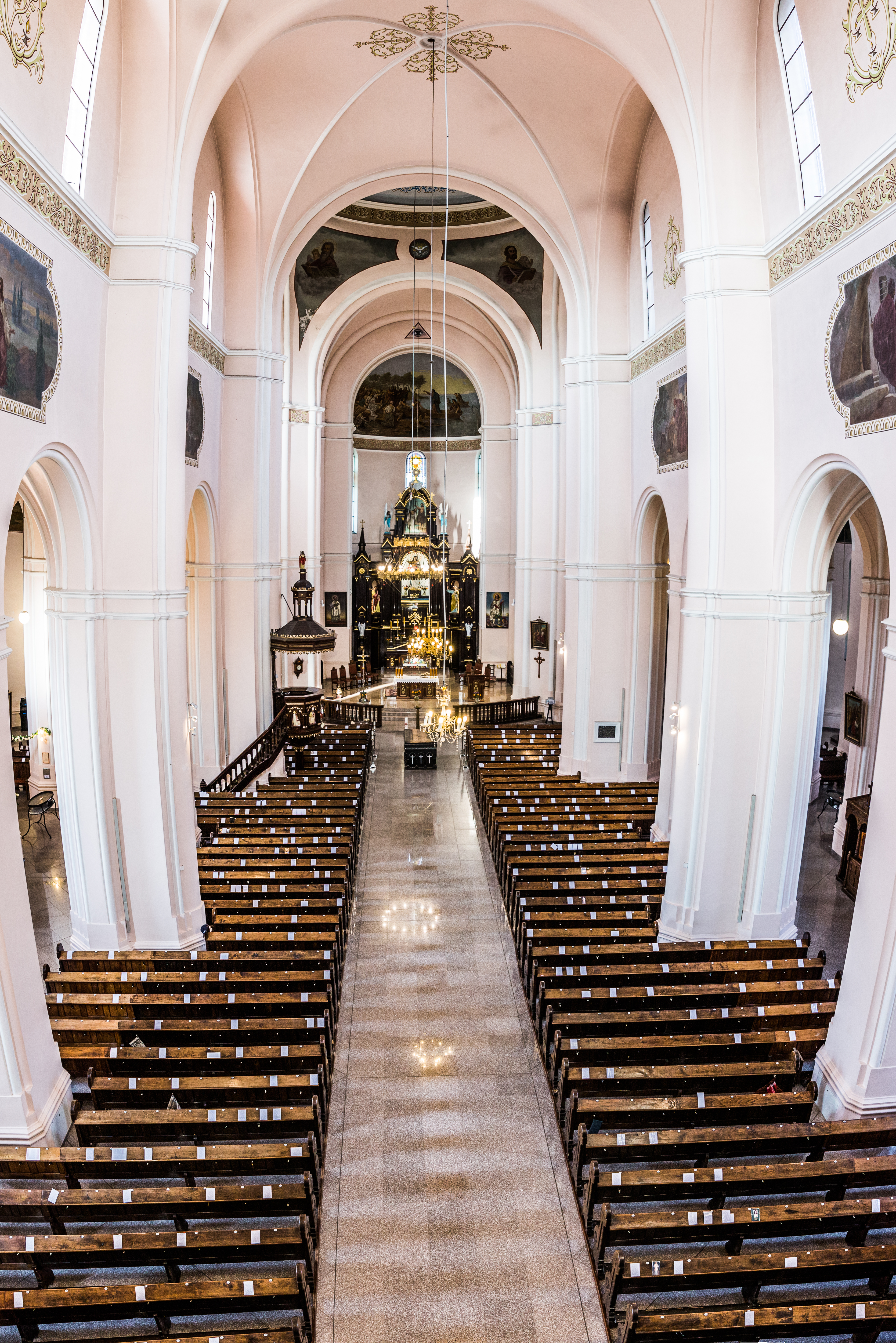 Šv. Jono Krikštytojo bažnyčios vidus